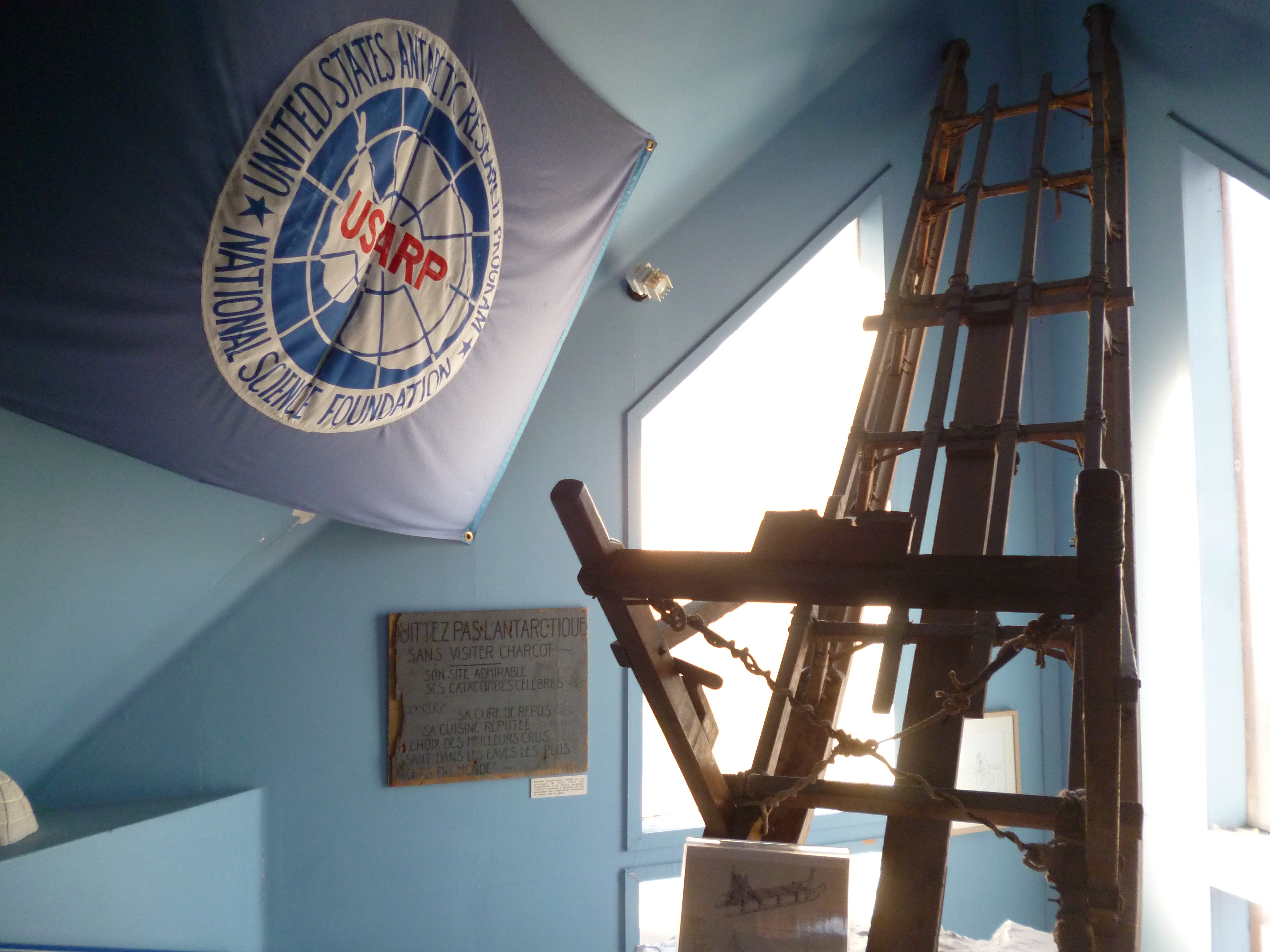 Drapeau de l'United States Antarctic Research Program (USARP) au Musée Paul-Emile Victor de Prémanon (Jura)